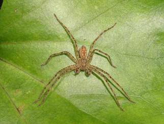 male Pseudopoda spirembolus from Okinawa.